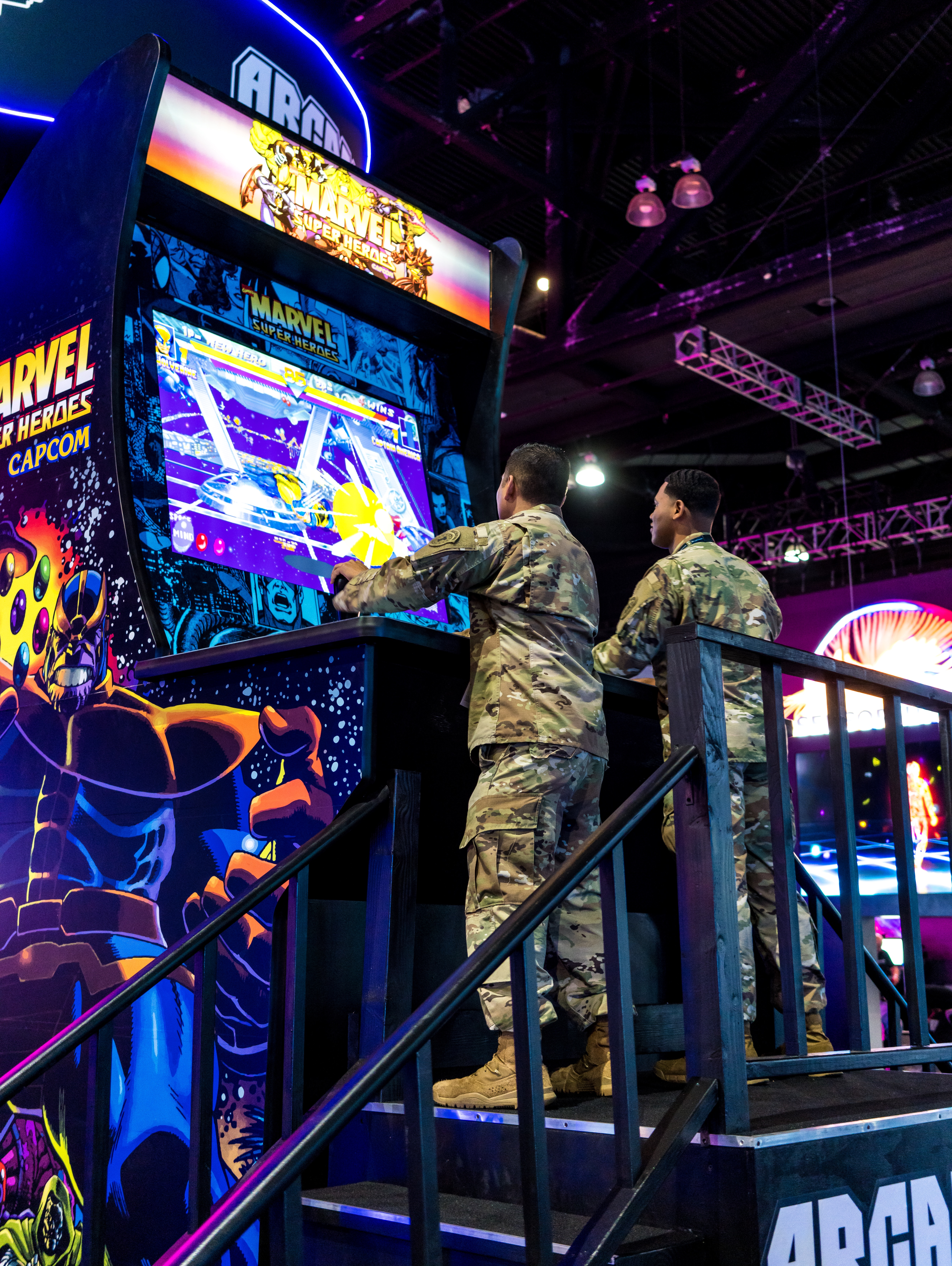 E3 2019 Electronic Entertainment Expo